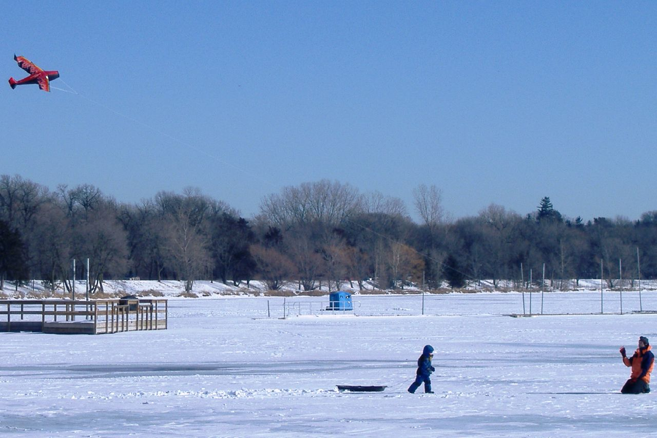 Kite flying festival, Lake Harriet, Minneapolis, Minnesota